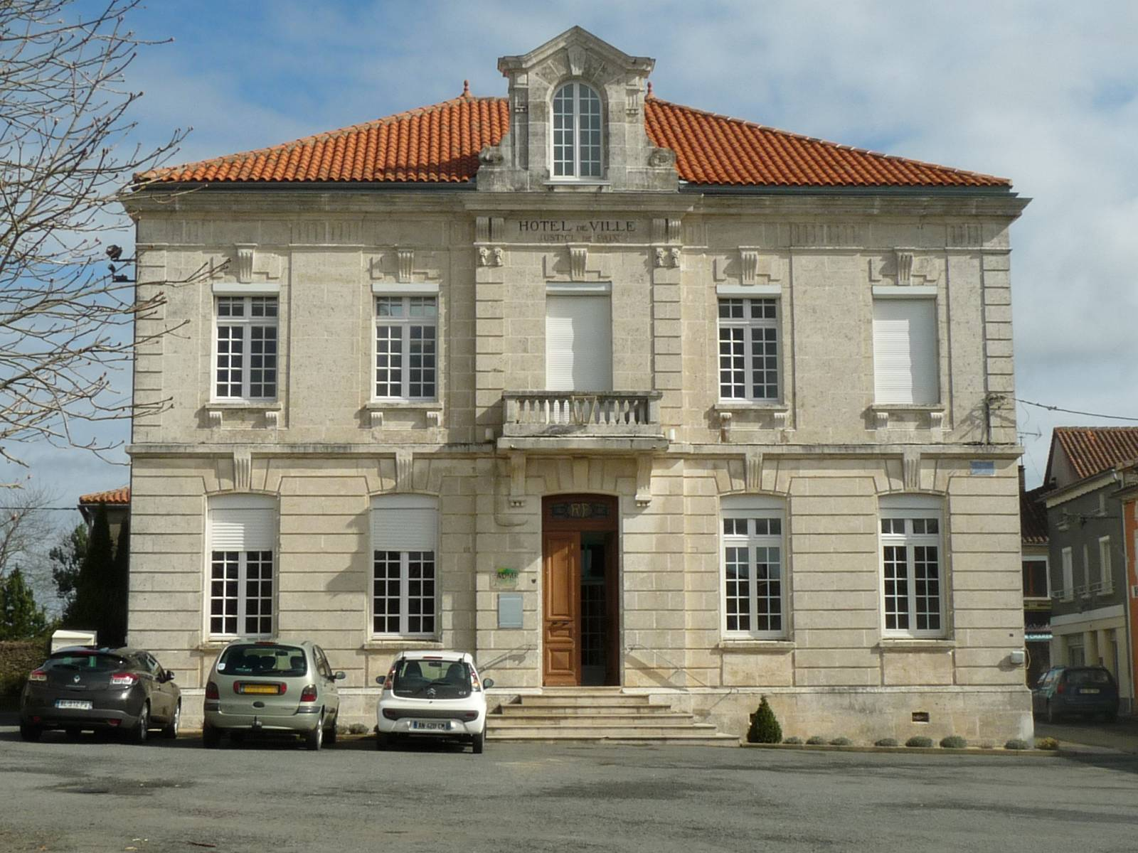 mairie de Montemboeuf, Charente, France